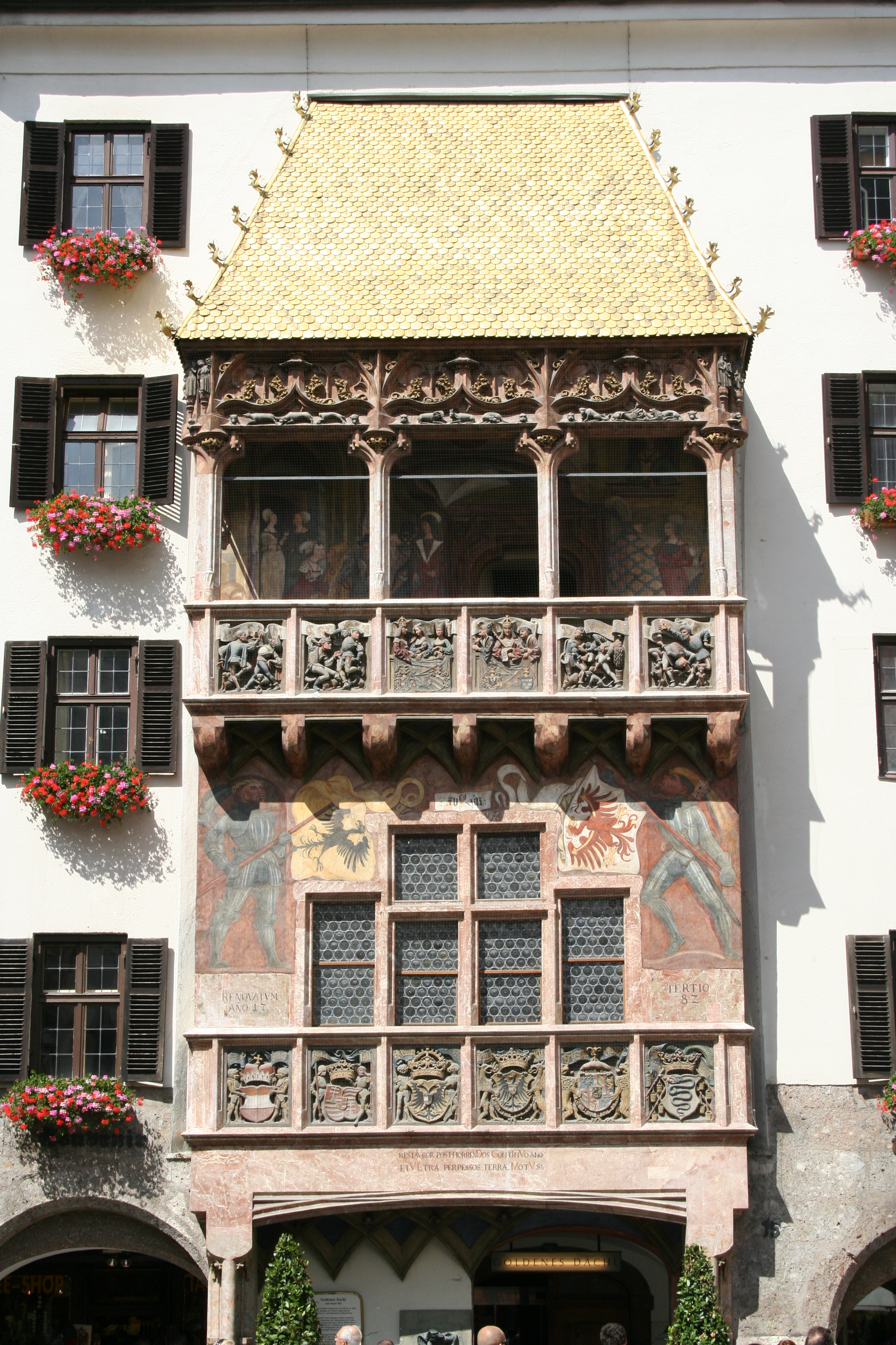 The Goldenes Dachl in Innsbruck